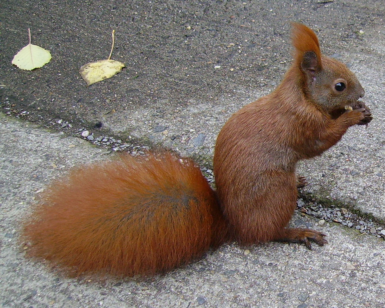 Eichhörnchen auf Beton